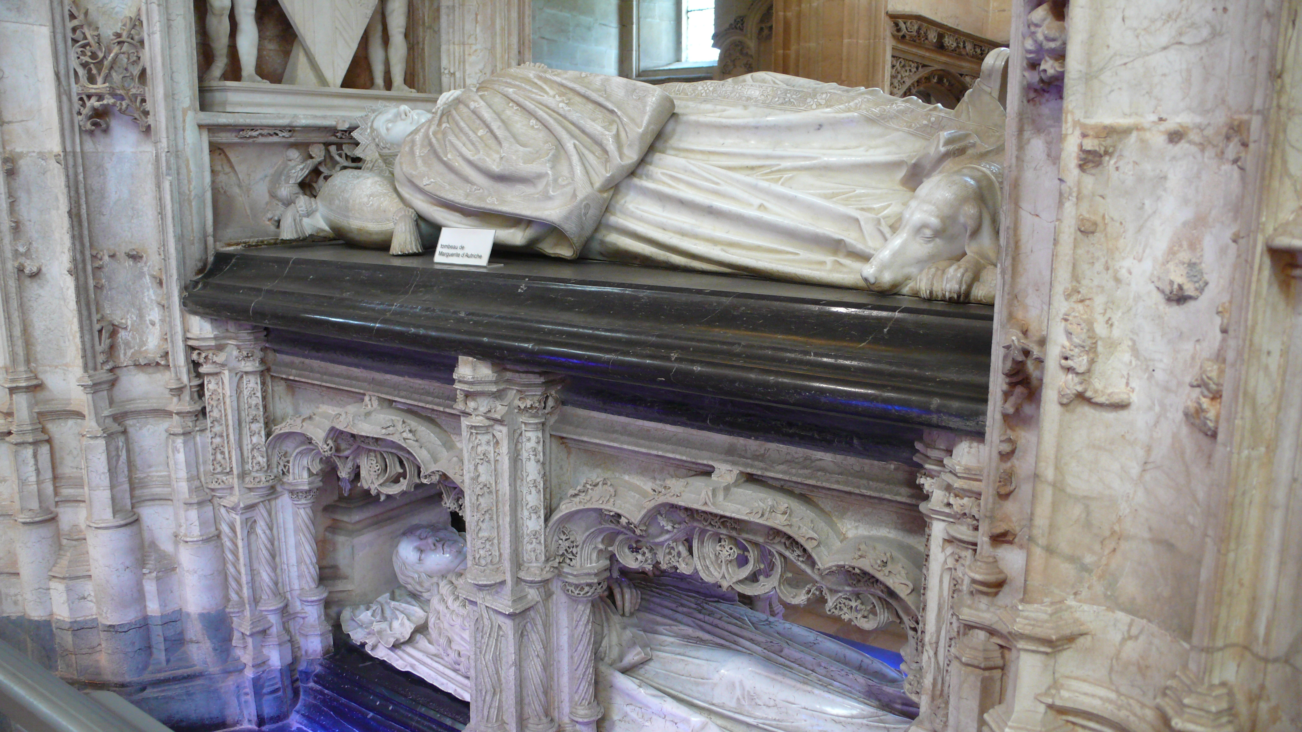 Église de Brou (Bourg-en-Bresse, Ain, France); tombeau de Marguerite d'Autriche